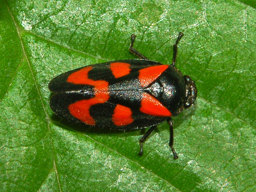 Cercopis vulnerata. Piani di Praglia, Genova, Italy